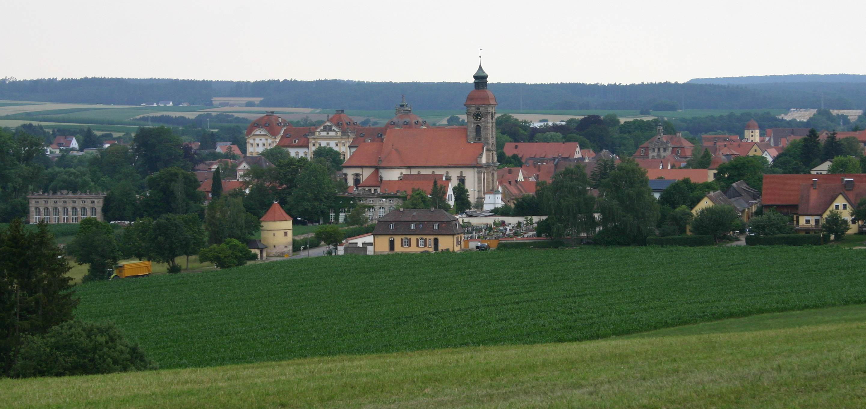 Ellingen.jpg